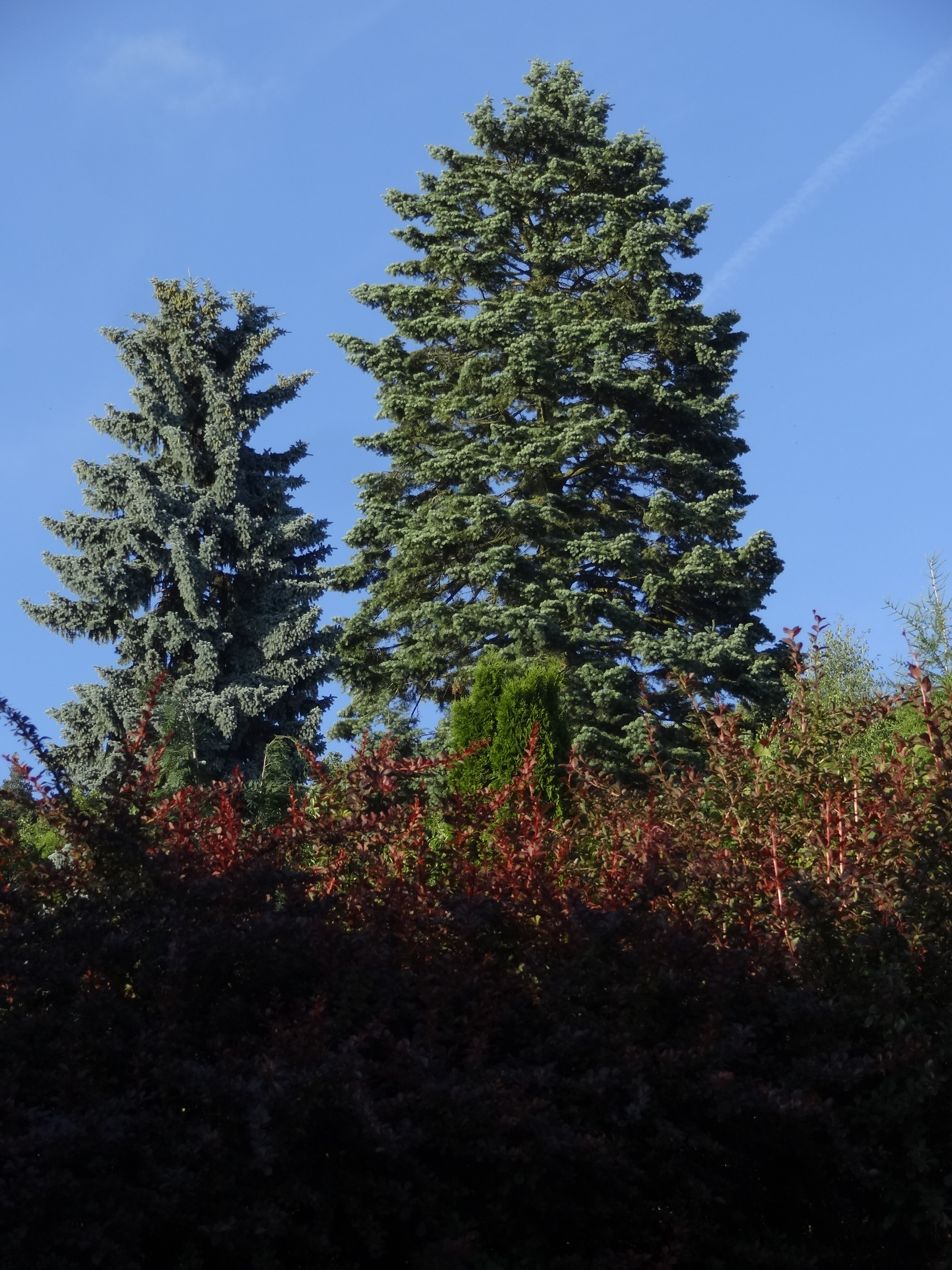 Starý Harcov (Liberec XV) - památná jedle ojíněná u Jirásků